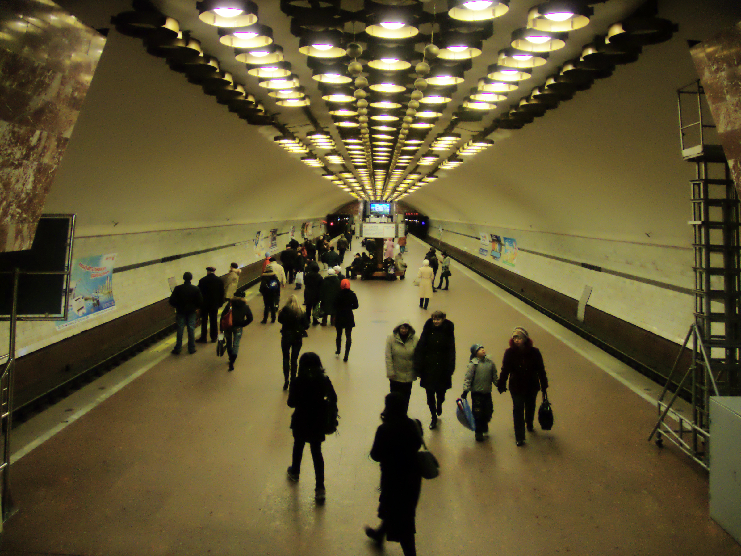 Станция "Заельцовская" Новосибирского метрополитена